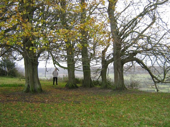 Arbres plantés après l'exécution des condammnés.